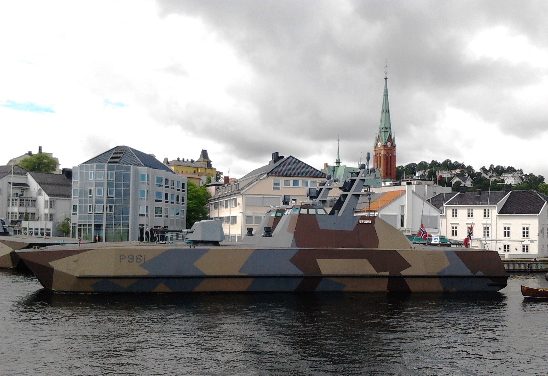 MTB KNM «Storm» i Arendal